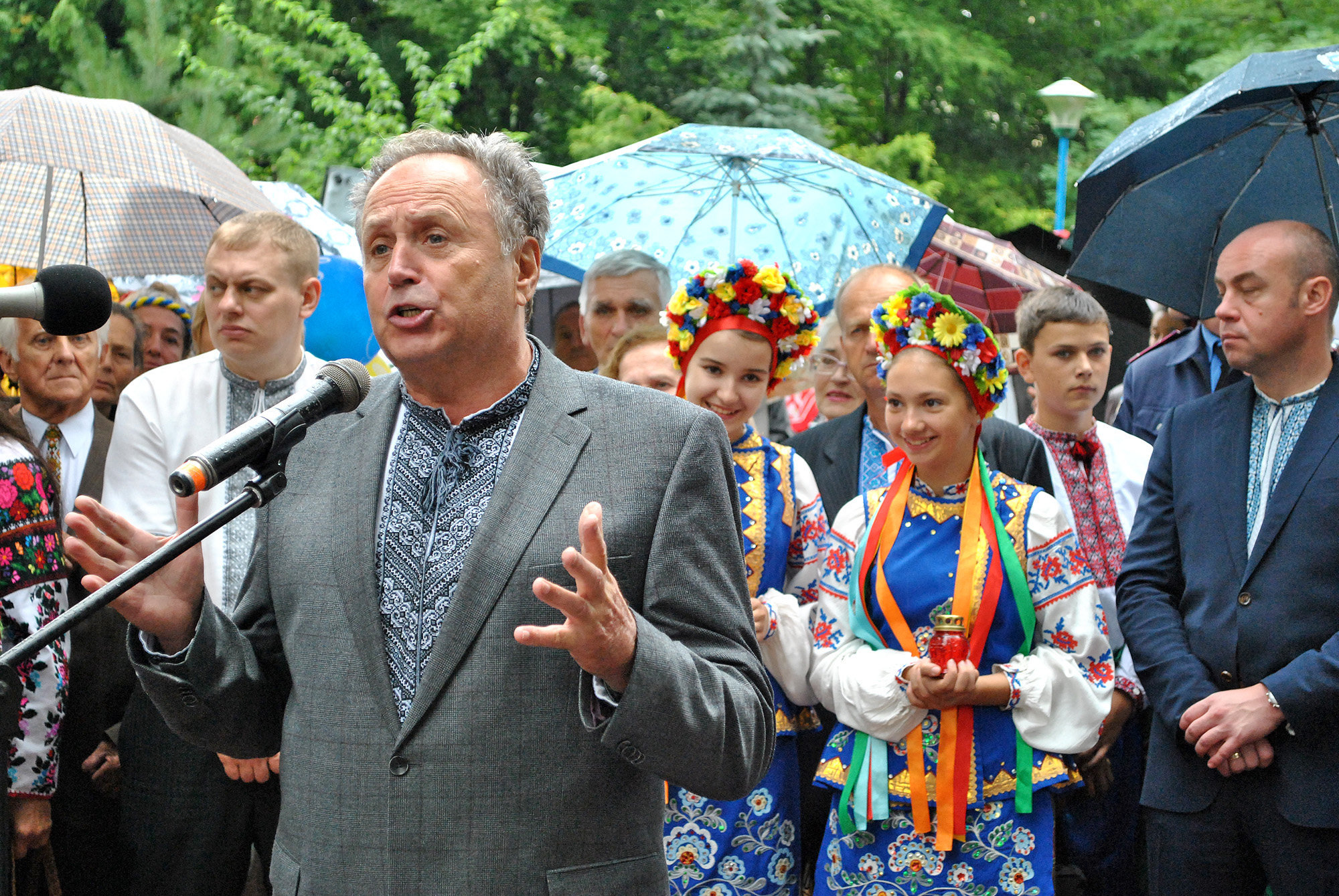 Відкриття пам'ятника українцям-жертвам депортації 1944-1946, 1951 років (м. Тернопіль). Співає заслужений артист України Богдан Іваноньків.